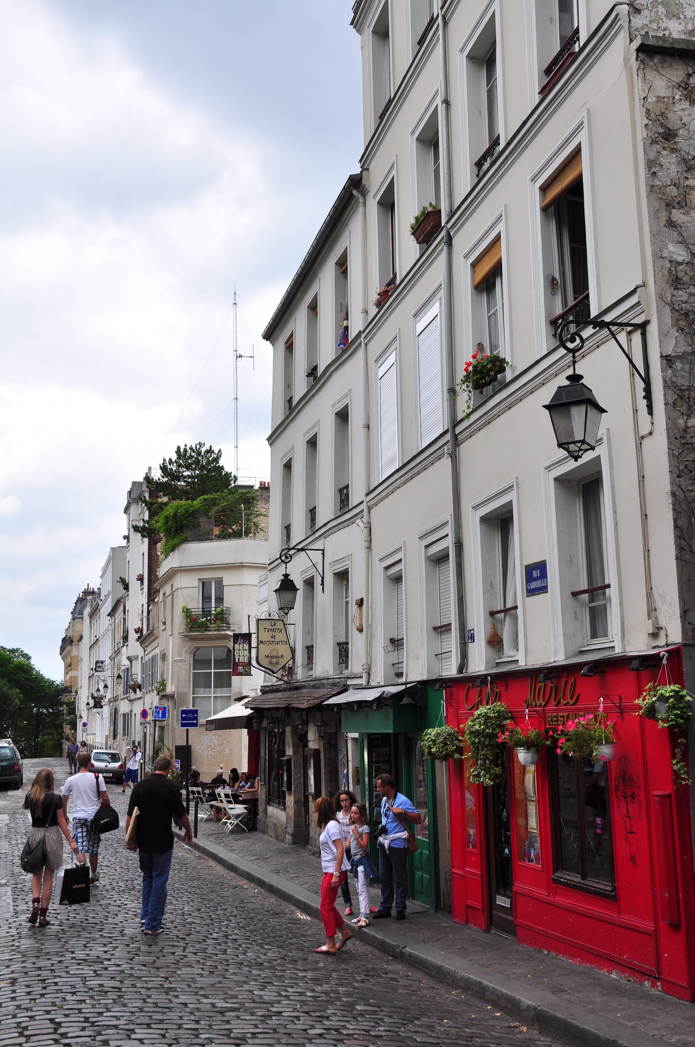 Rue Gabrielle, Paris, France. Champs-Élysées stage, 2010 Tour de France.